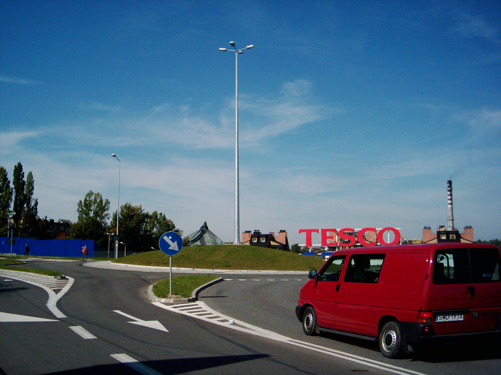 Wodzisław Śląski - Rondo na ulicy 26 Marca. Za rondem widoczny supermarket TESCO.